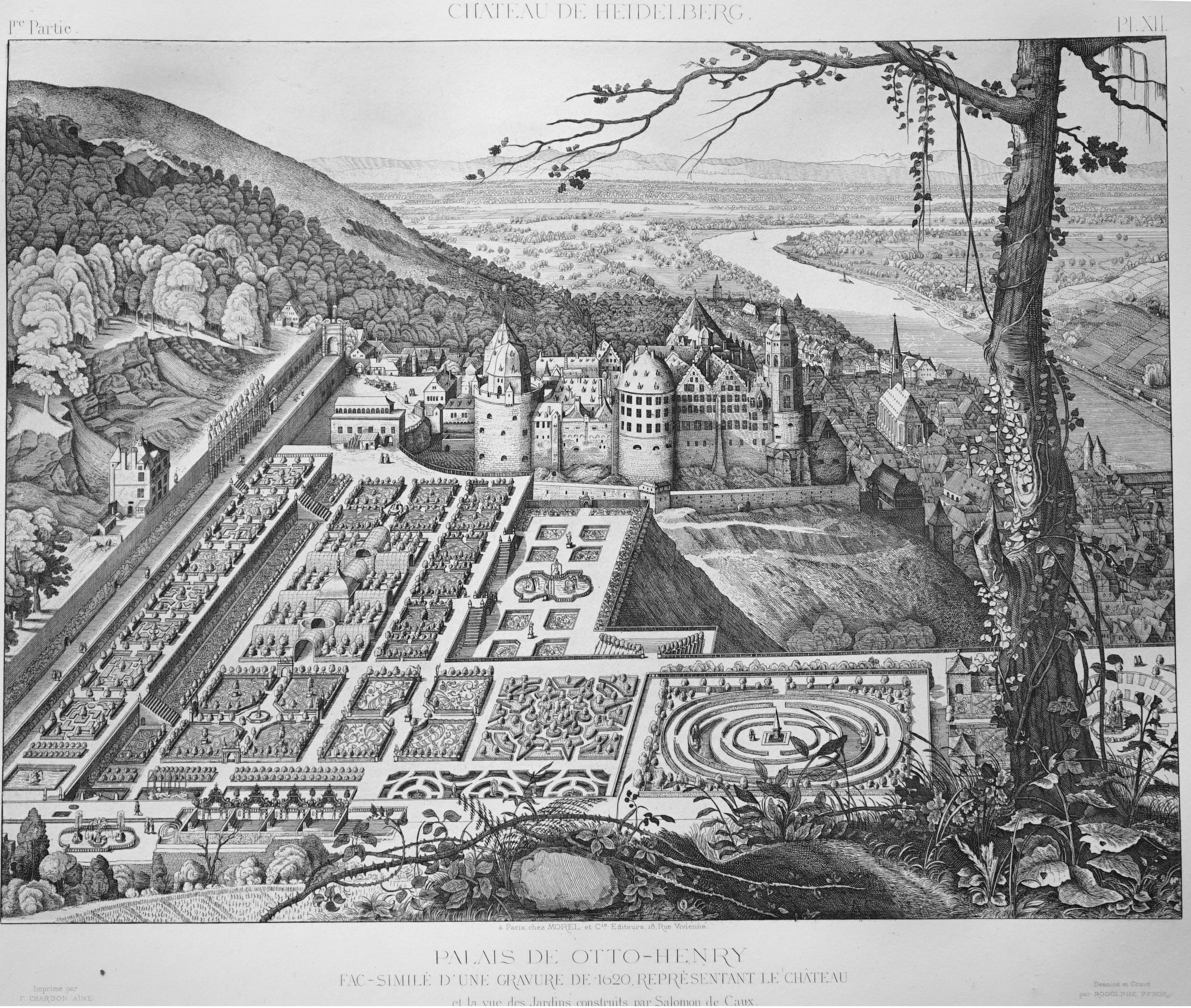 rédigé par R. Pfnor.